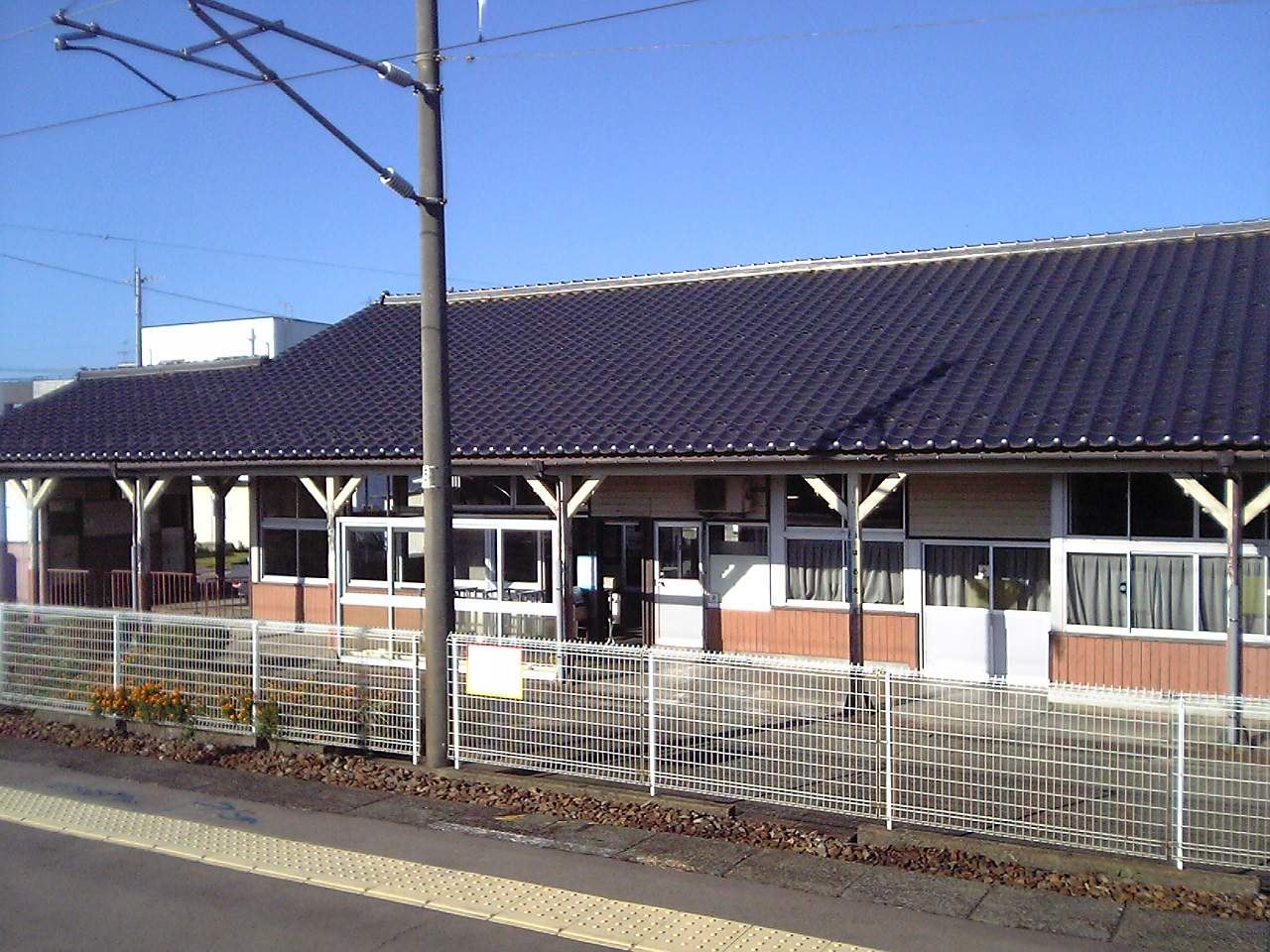 ホームから見た春江駅駅舎(2009/10/12撮影）